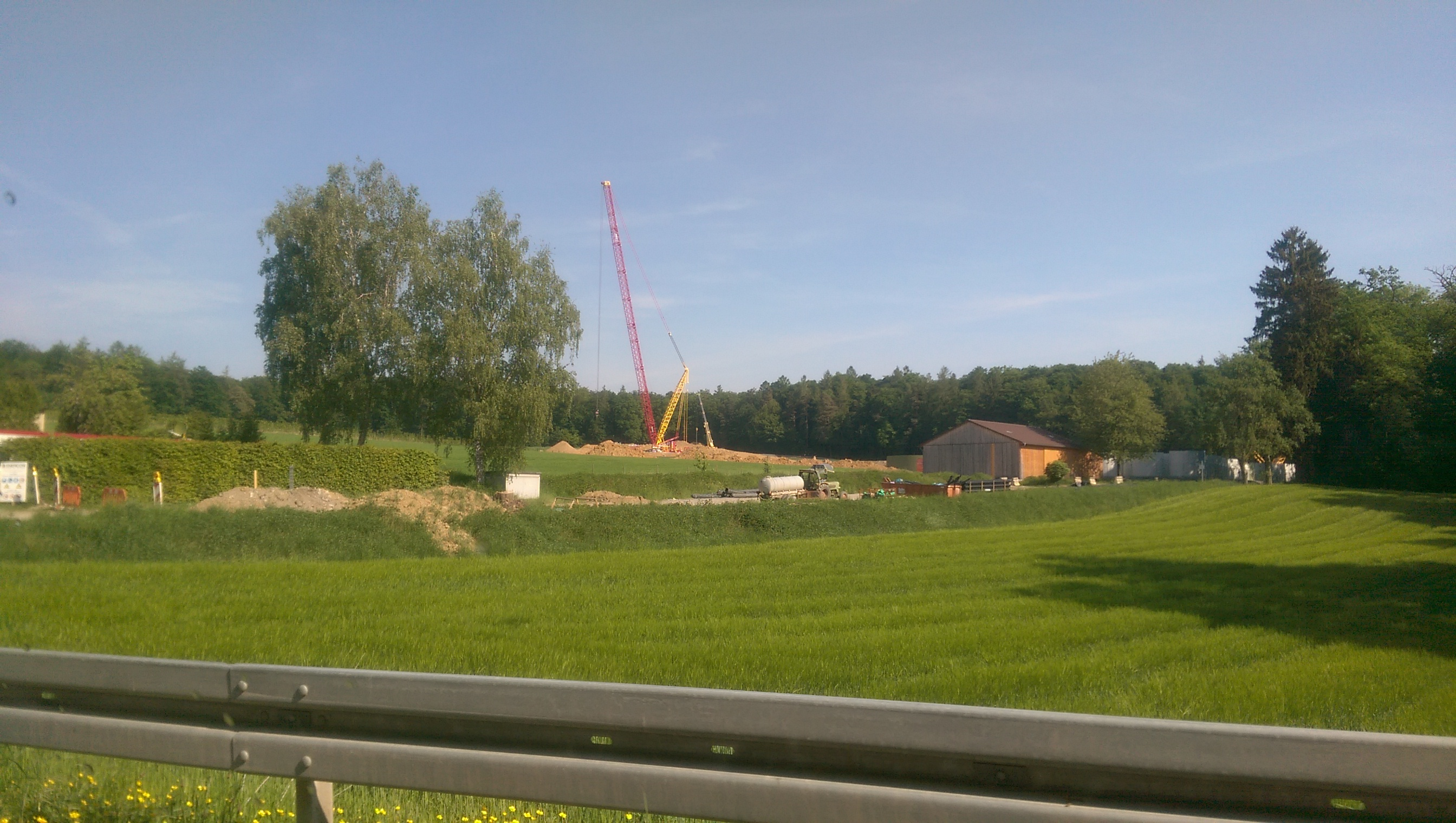 Turmbau mit einem Raupenkran LR 1600/2 – 600 t von der Firma Neeb- Krane